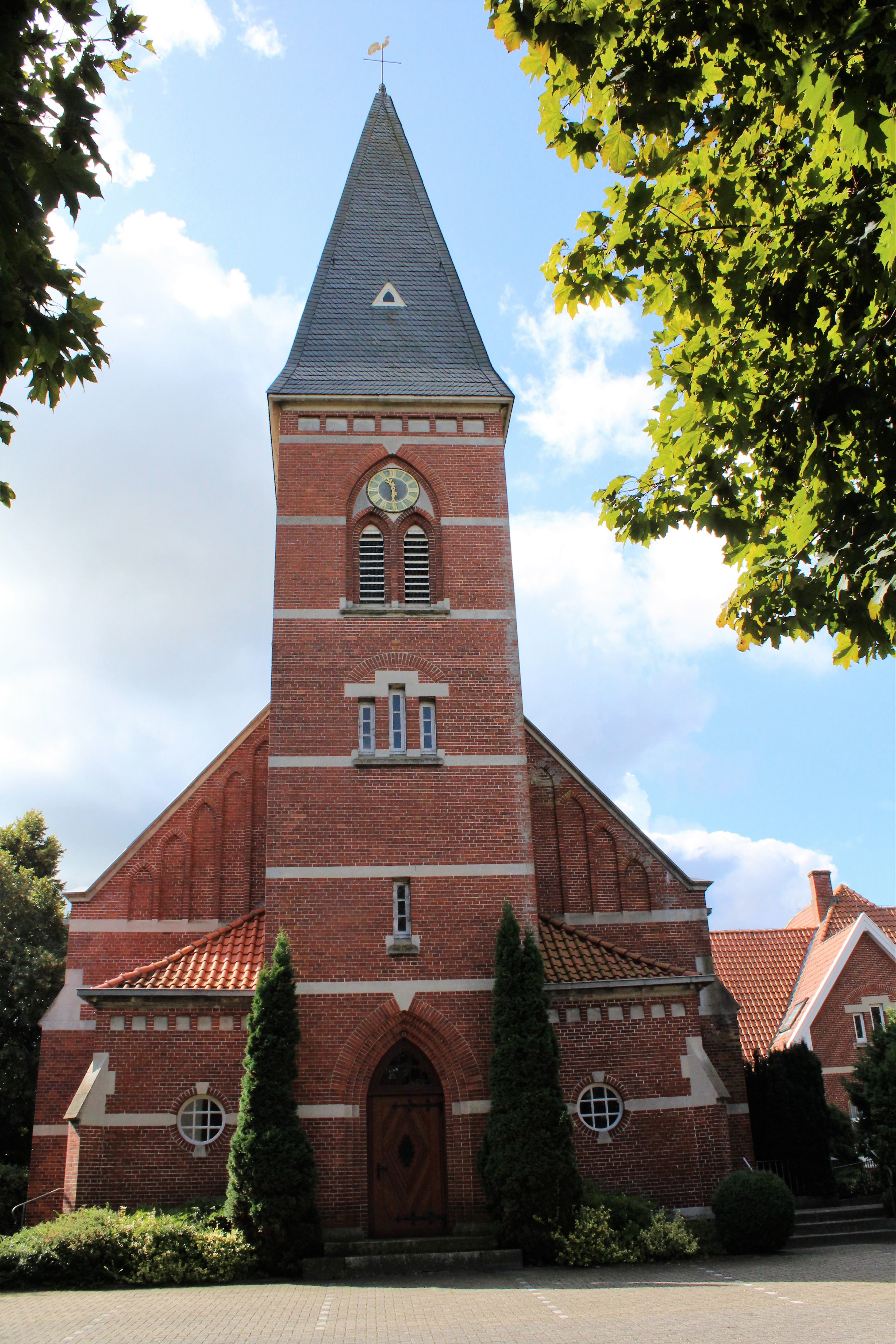 Ev.-reformierte Kirche Möhlenwarf, Landkreis Leer, Ostfriesland, Deutschland